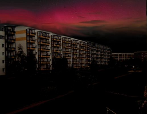 Nordlicht über Jena